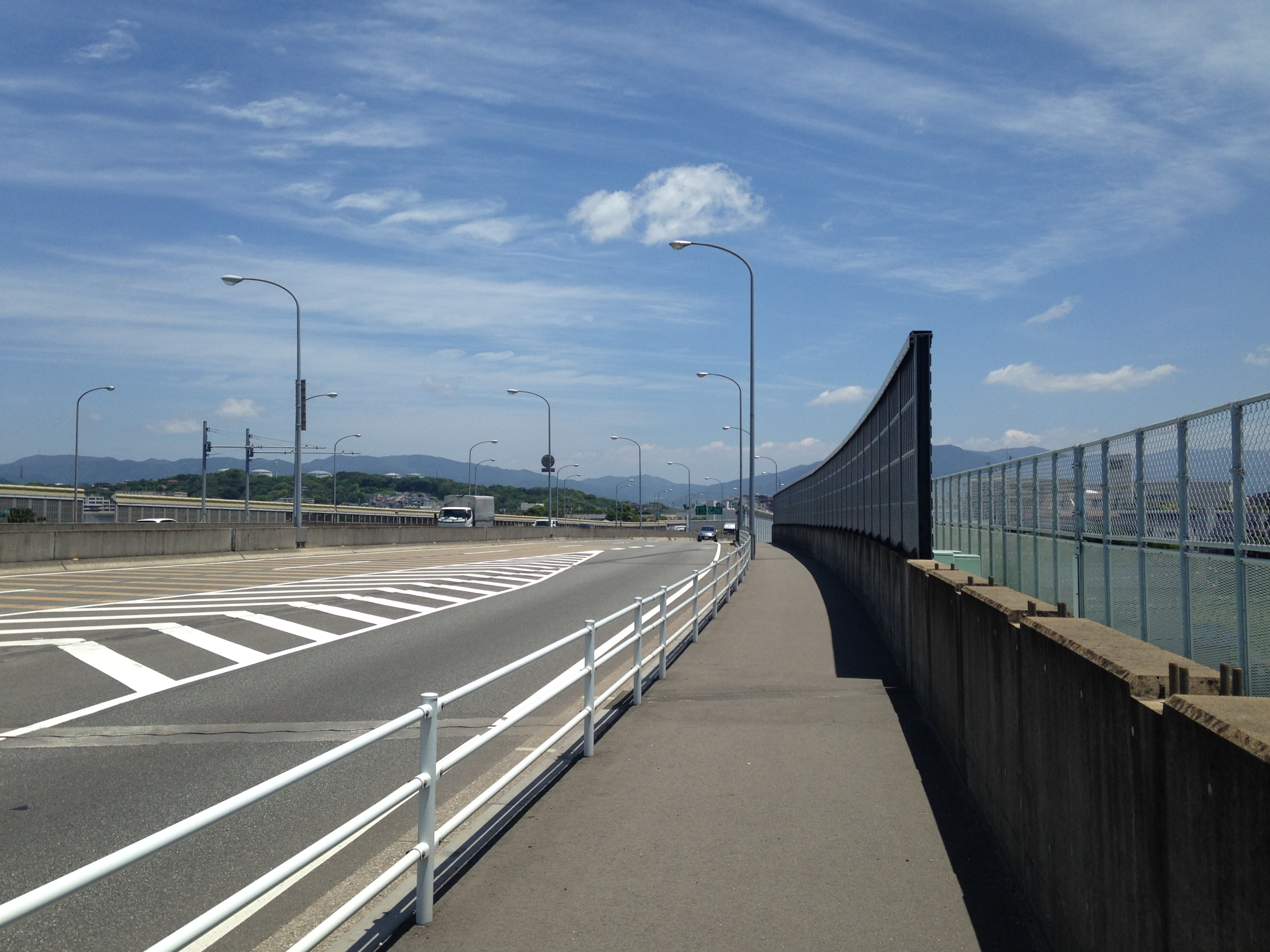 福岡都市高速粕屋線(左側)と流通センター通り(右側)